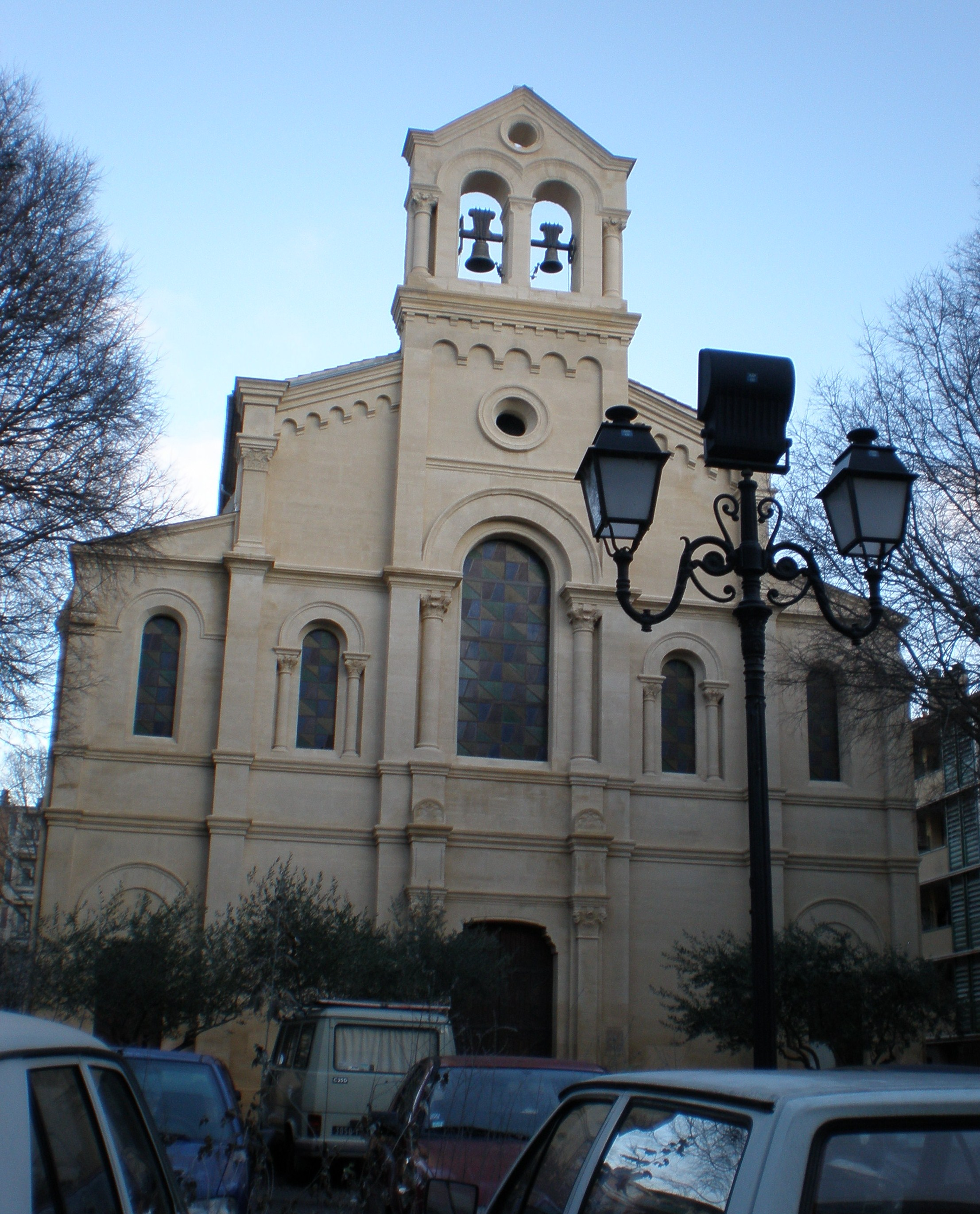 Le temple protestant d'Alès (Gard), construit entre 1864 et 1868